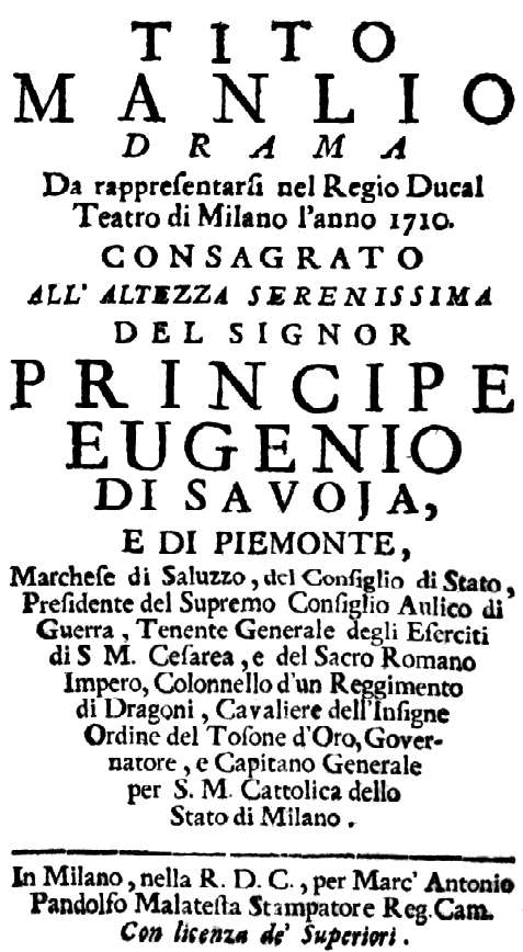 Paulo Magni - Tito Manlio - title page of the libretto - Milan 1710